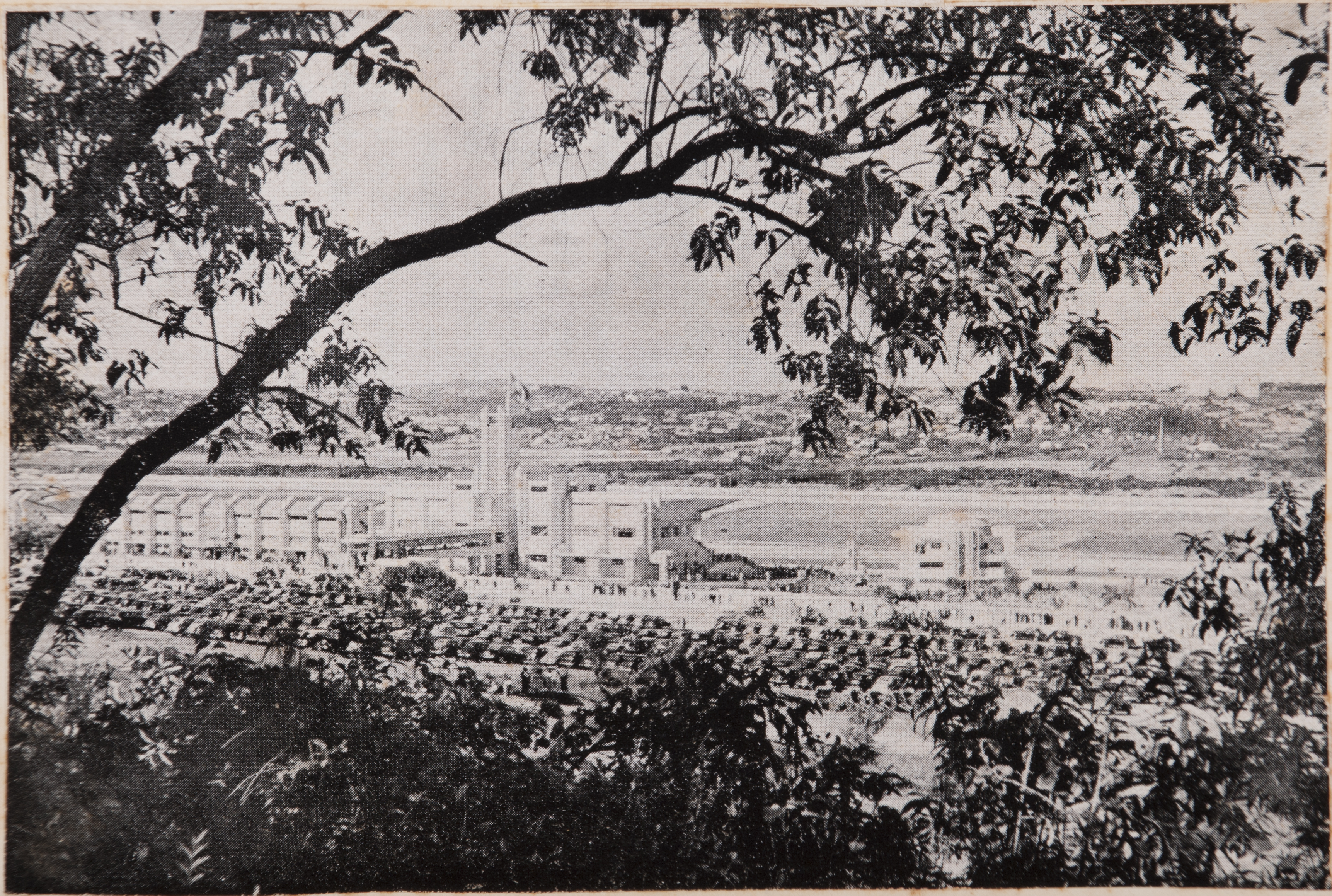 Obra que integra o acervo do Museu Paulista da USP. Coleção João Baptista de Campos Aguirra.